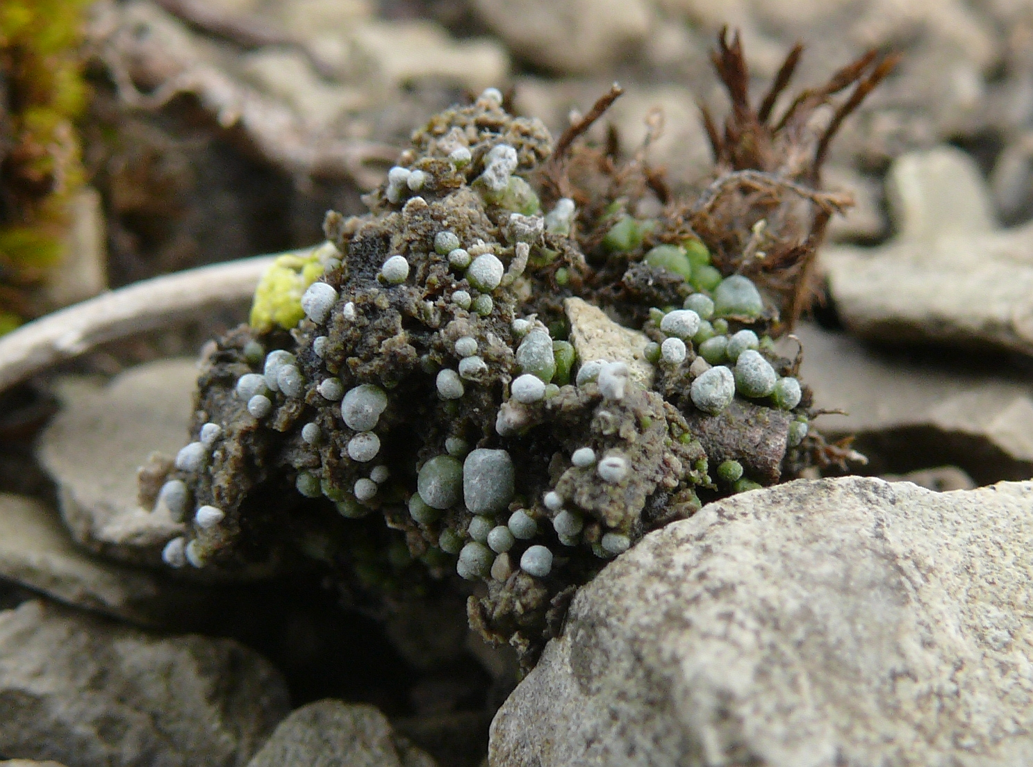 Toninia sedifolia, Tauberland, Deutschland